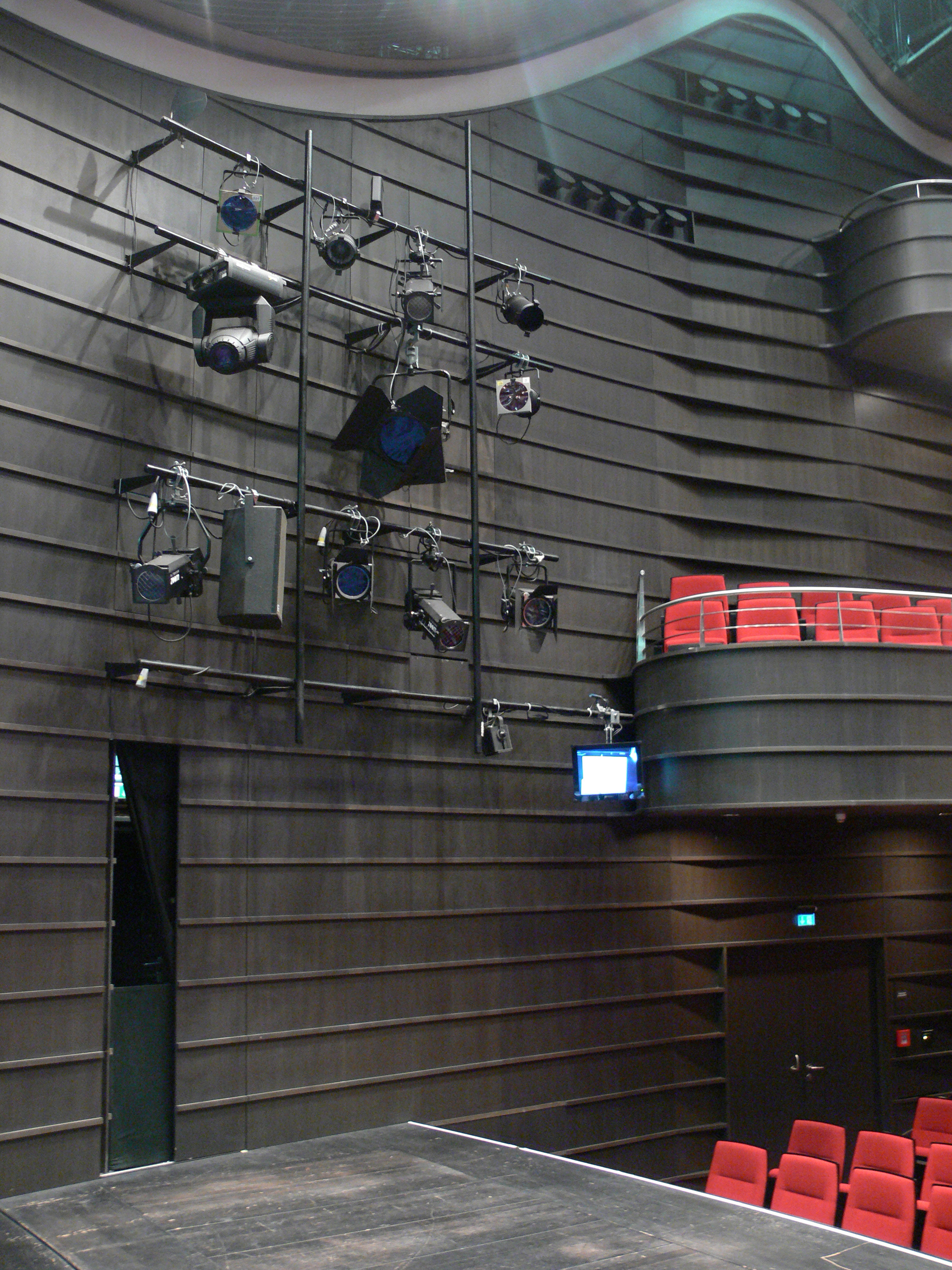 Theater Bielefeld, Beleuchtung im Zuschauerraum, von der Bühne aus gesehen